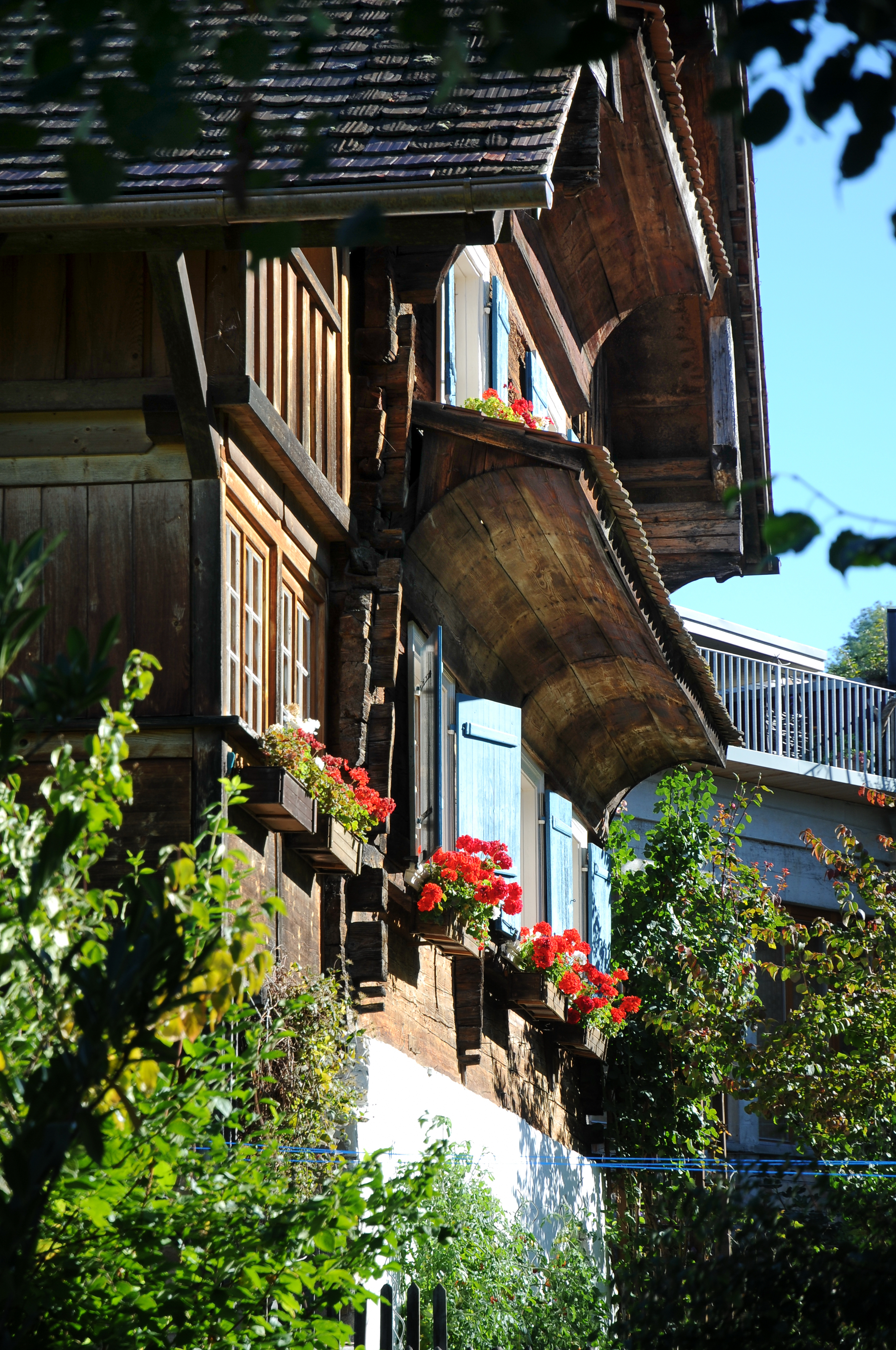 aus dem DEHIO Vorarlberg 1983: Mitteldorfgasse (Haselstauden ) Nr.10: Rheintalhaus, Einhof, Wohnteil 18.Jh. (?), Blockbau mit Kopfstrick auf hohem Kellersockel, traufseitiger Schopf, Klebdäcker, Giebel und Flugstreben verschalt, geschweifte Pfettenköpfe.